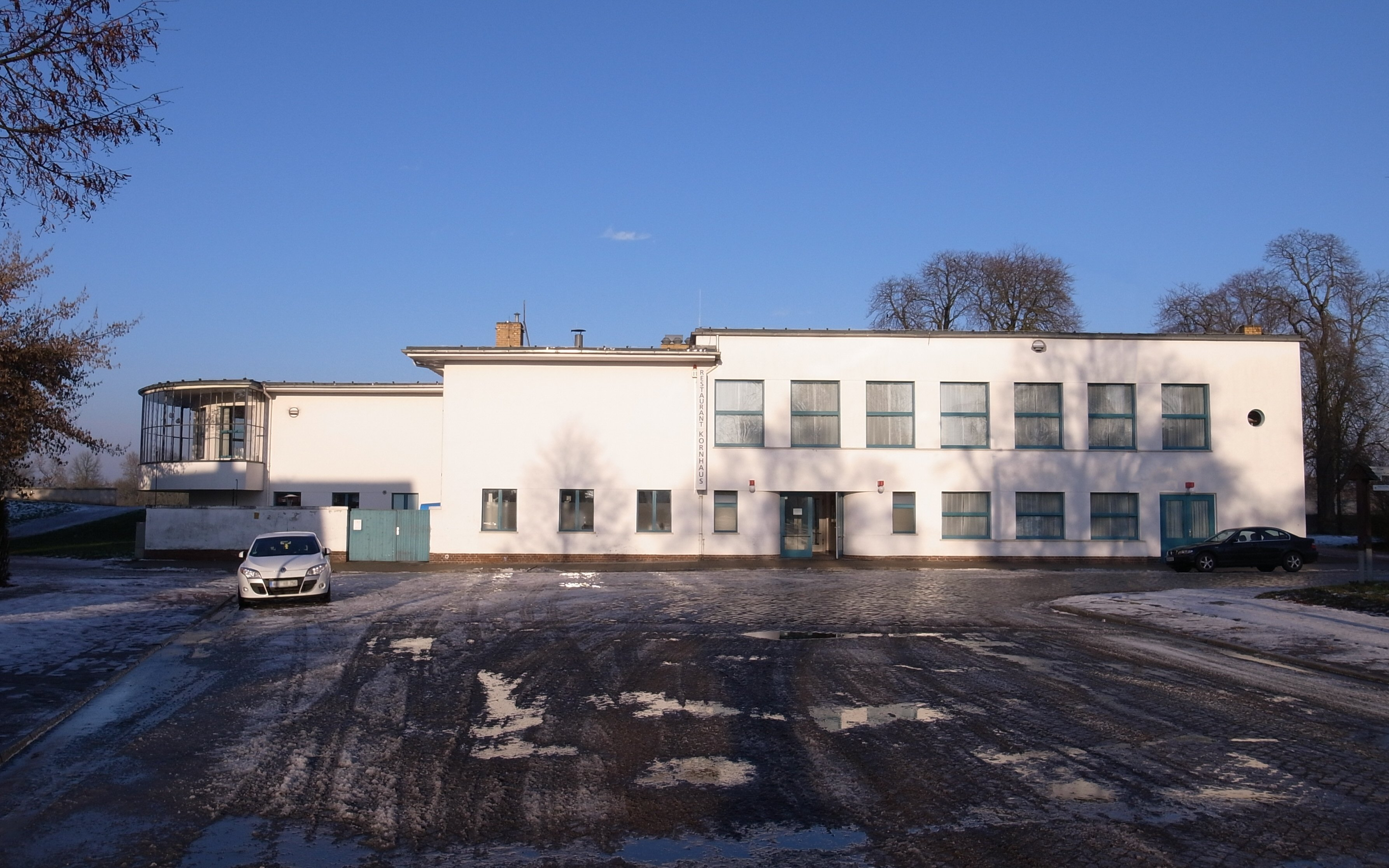 Kornhaus Dessau, Straßenseite